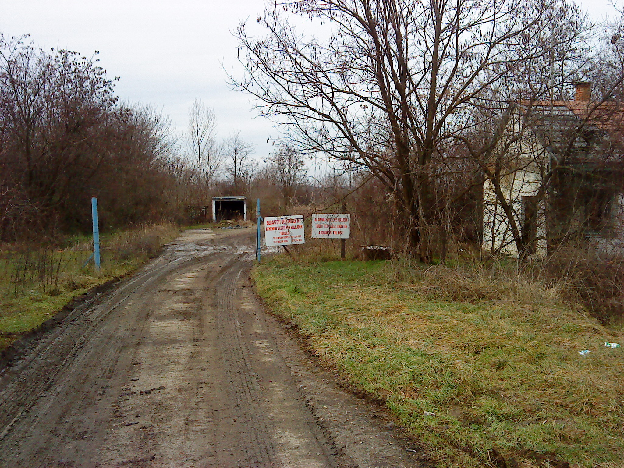 Garéi veszélyes hulladék-tároló bejárata